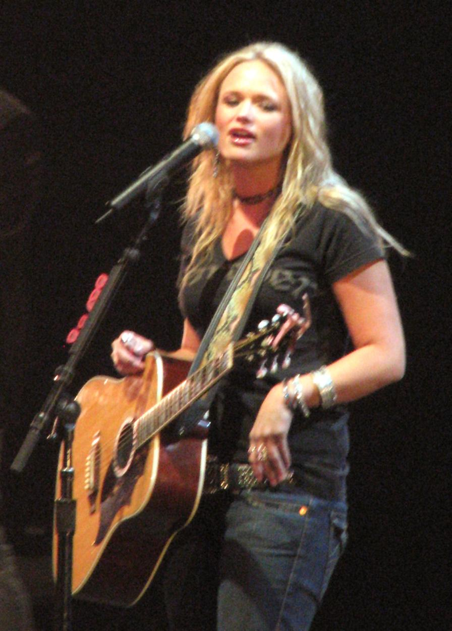 Miranda Lambert